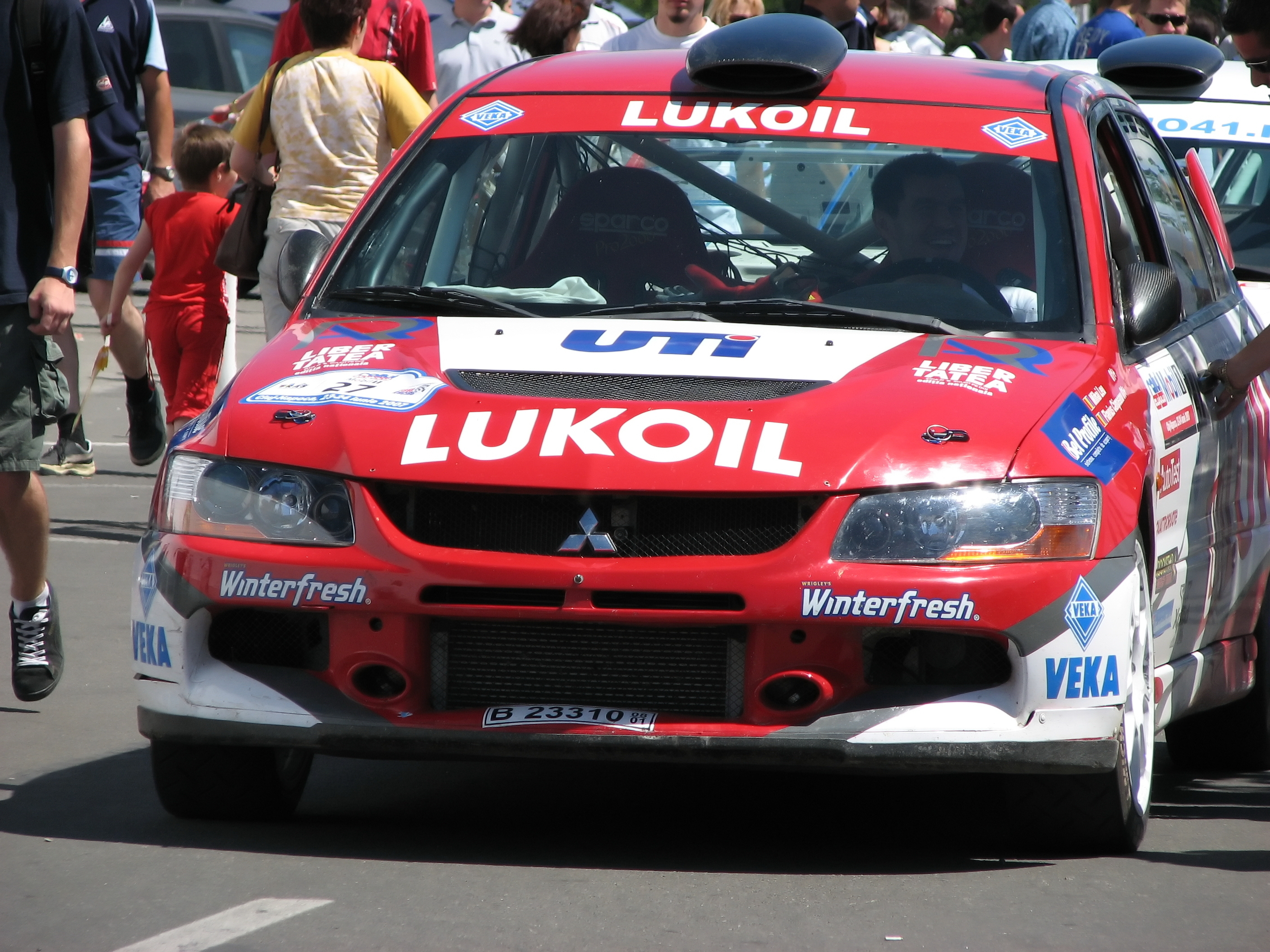 24 Iunie 2007 - etapa 6-a nationala - proba speciala din parcarea hipermarketului Cora.